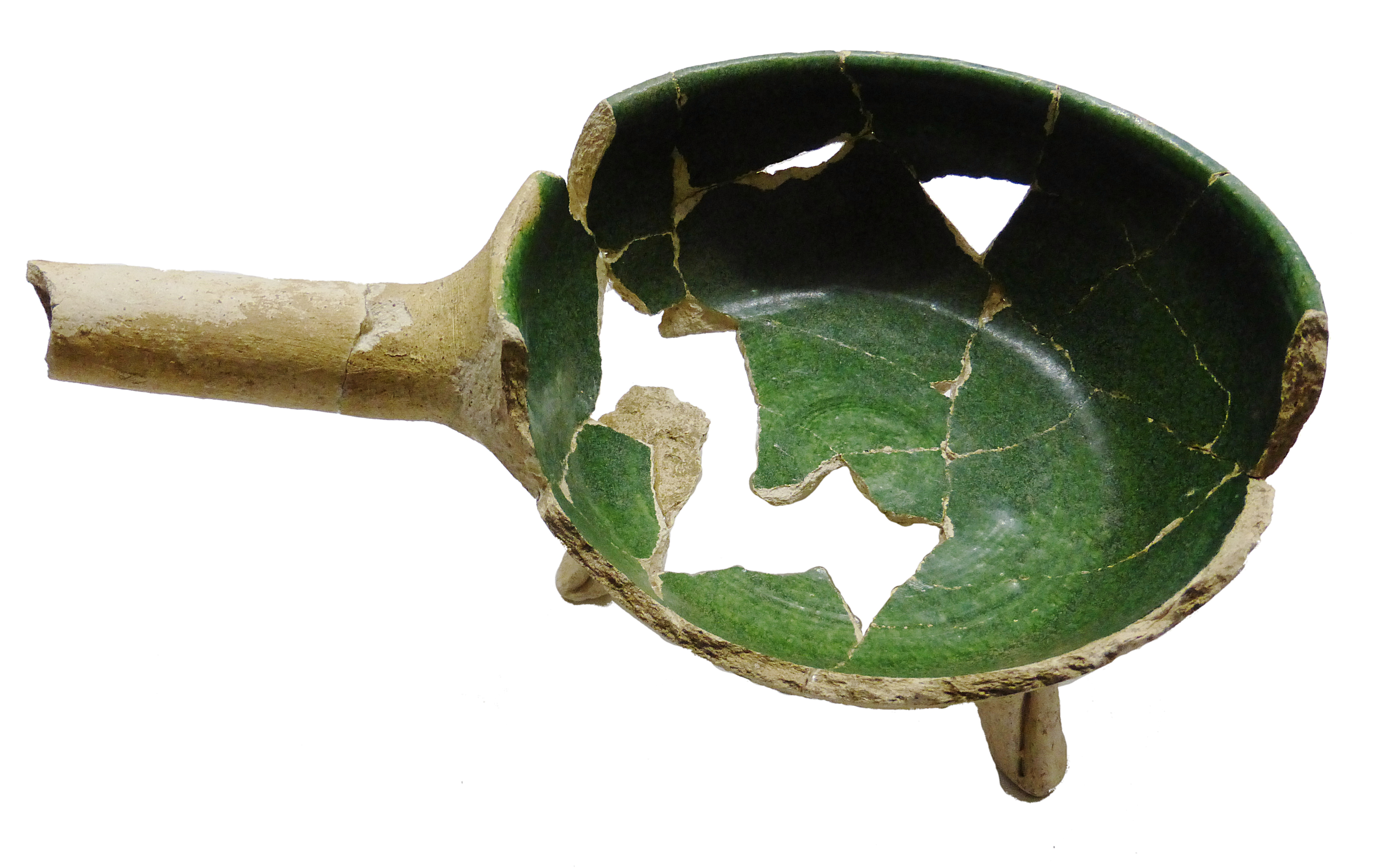 Rekonstruierter Kochtopf aus Niederbayern / Rottal. Hafner (Töpfer)